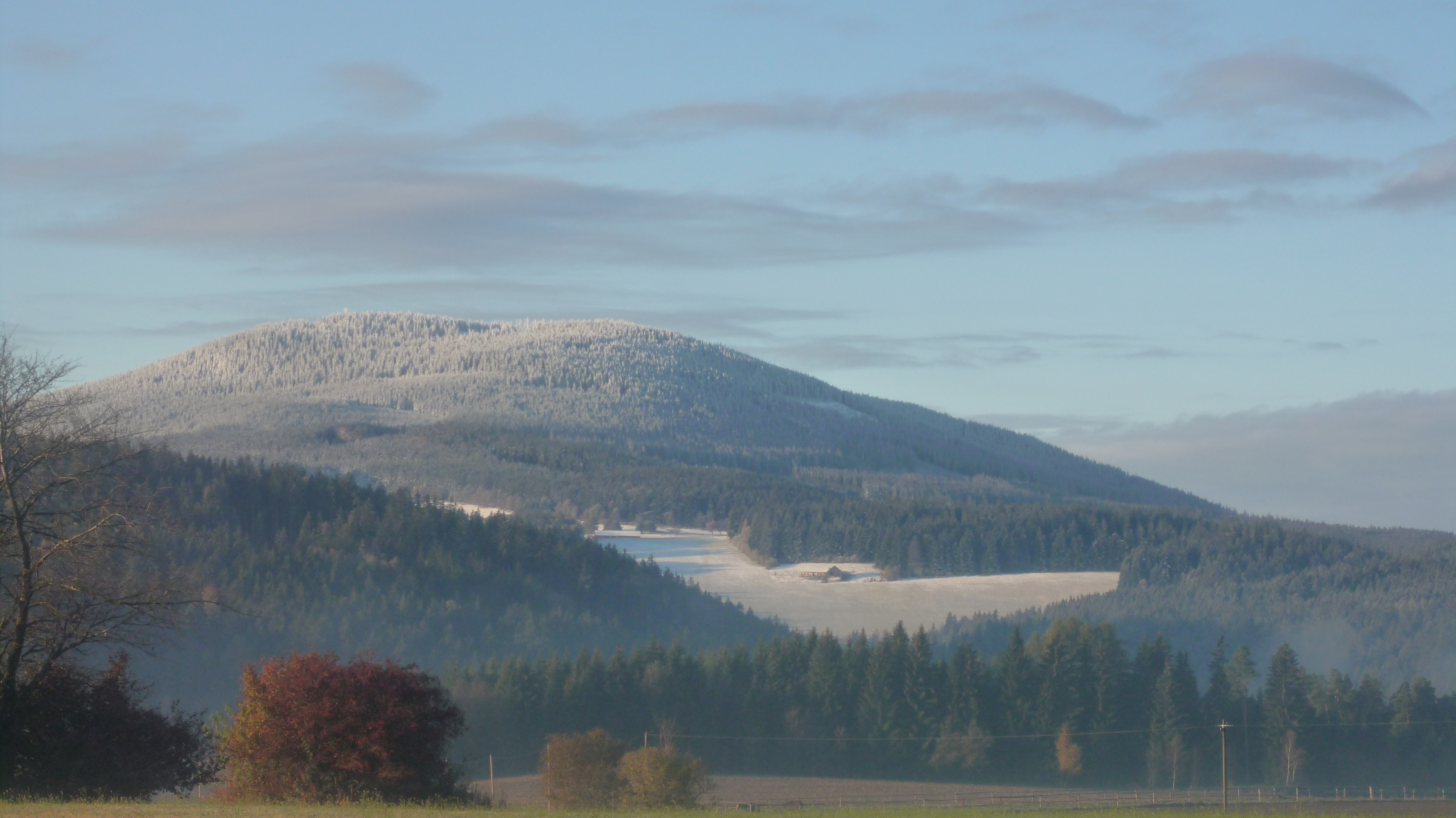 Hora Boubín